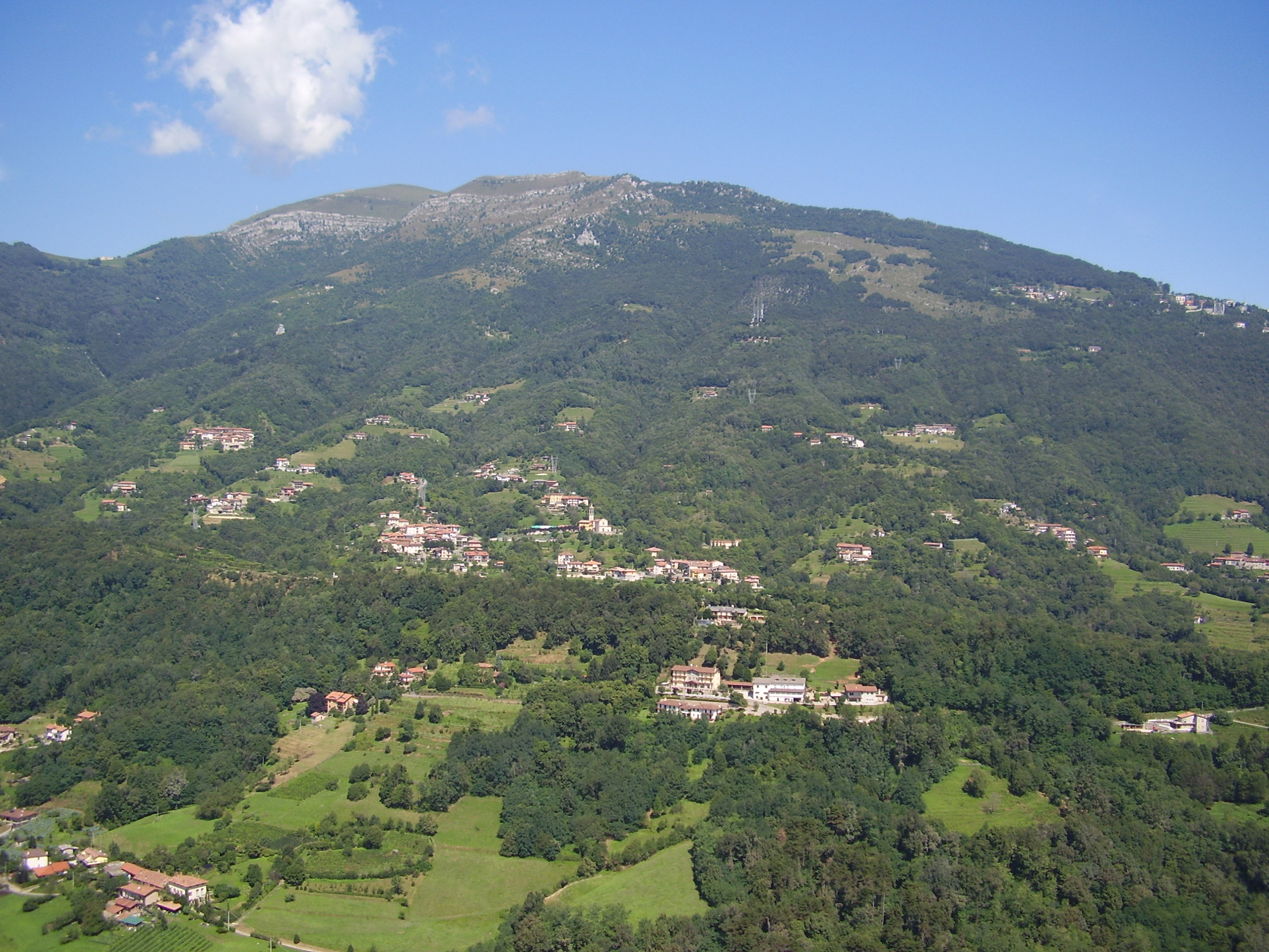 Monte Linzone visto da Palazzago